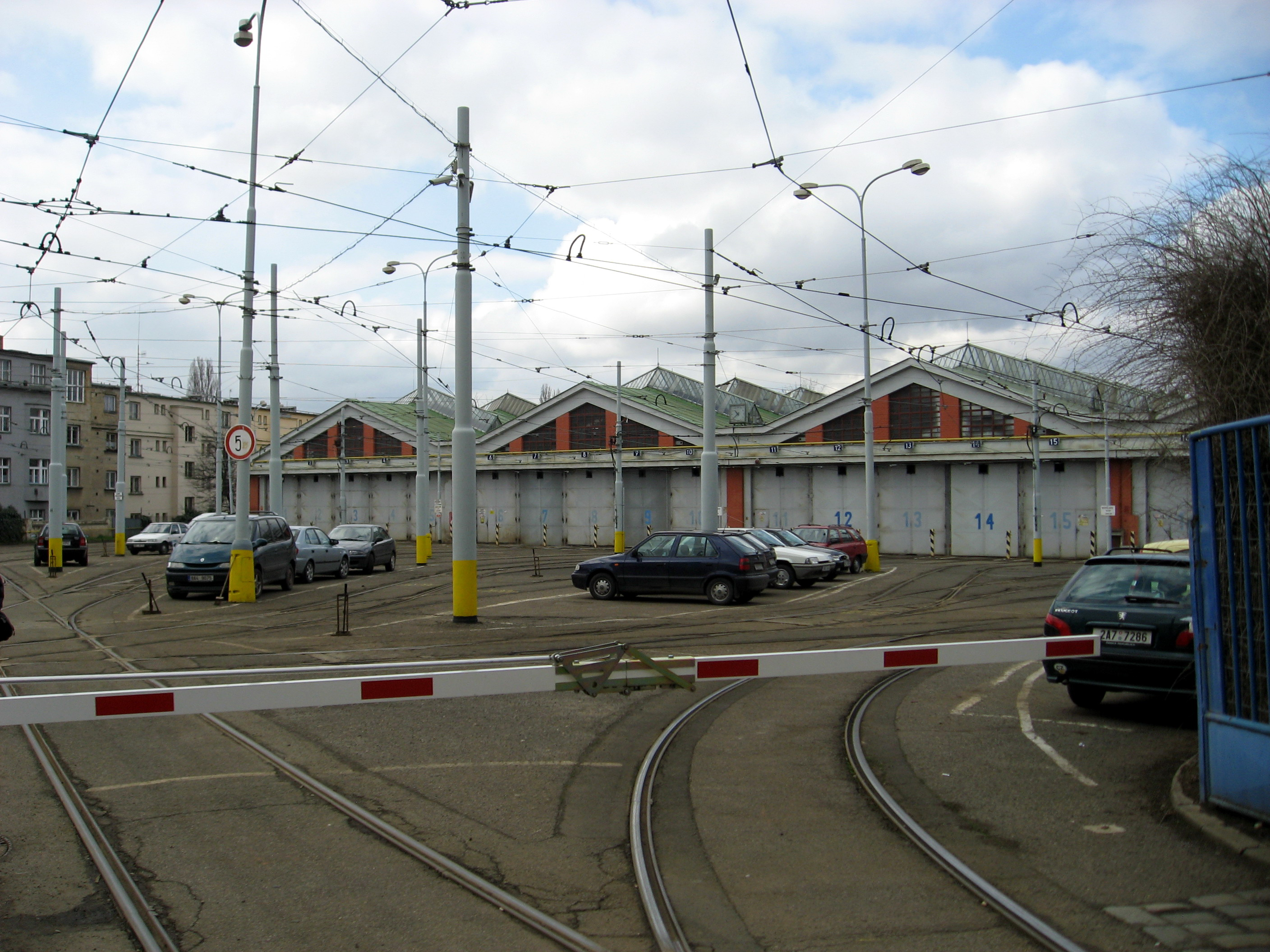 Vozovna Strašnice